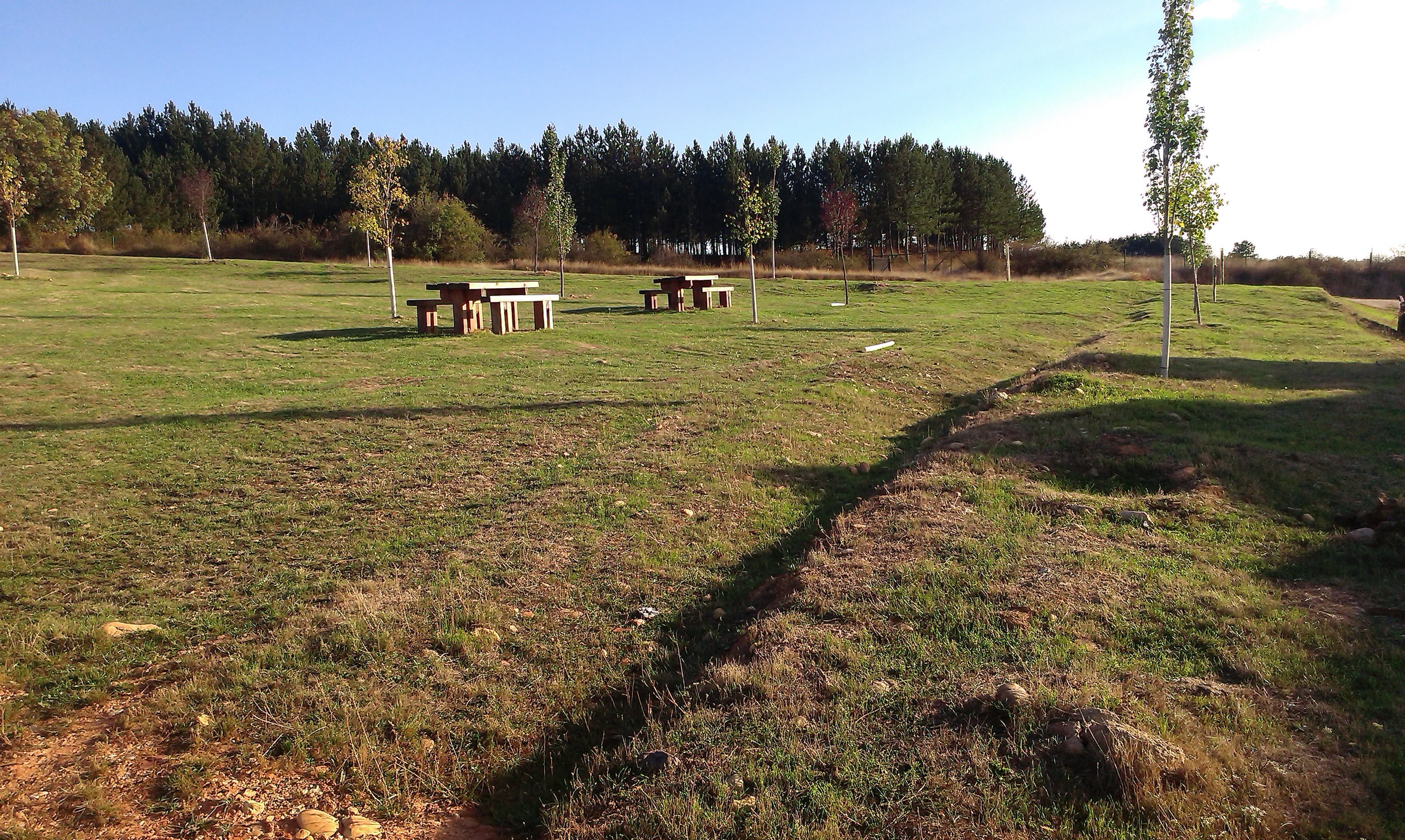 Parque Campo dela cruz Canalejas